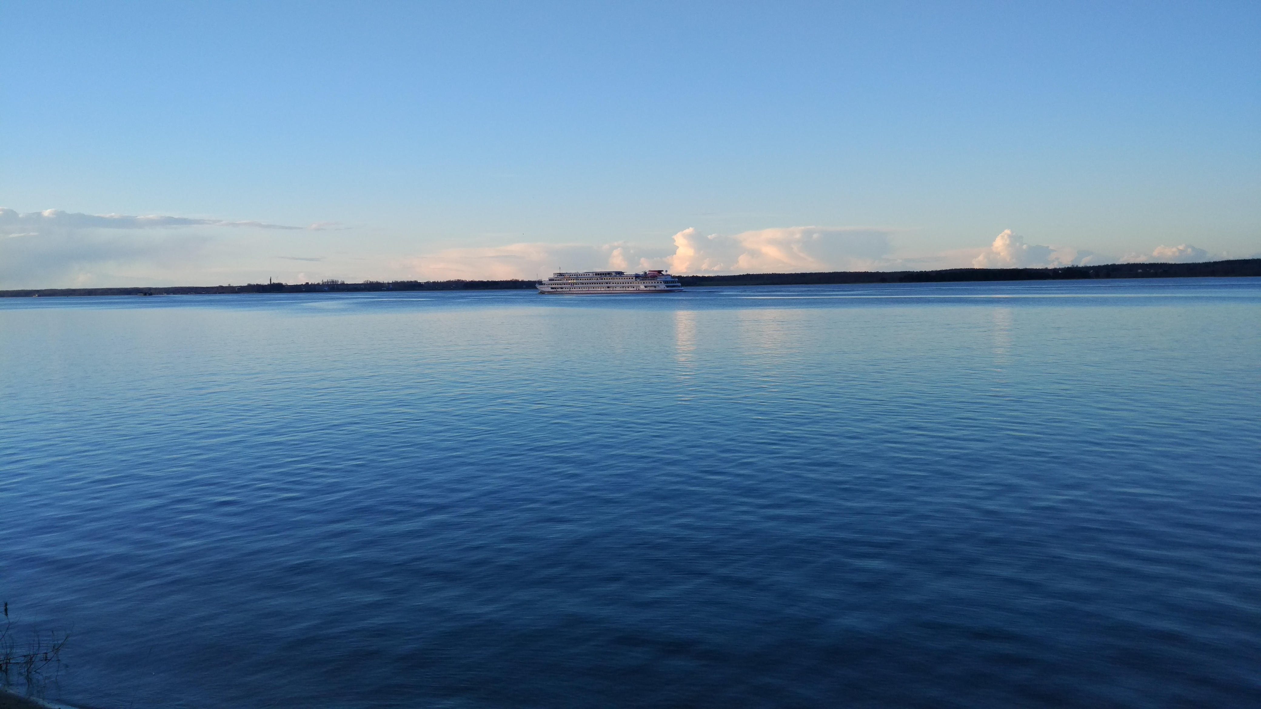 Вид с берега п. Судоверфь